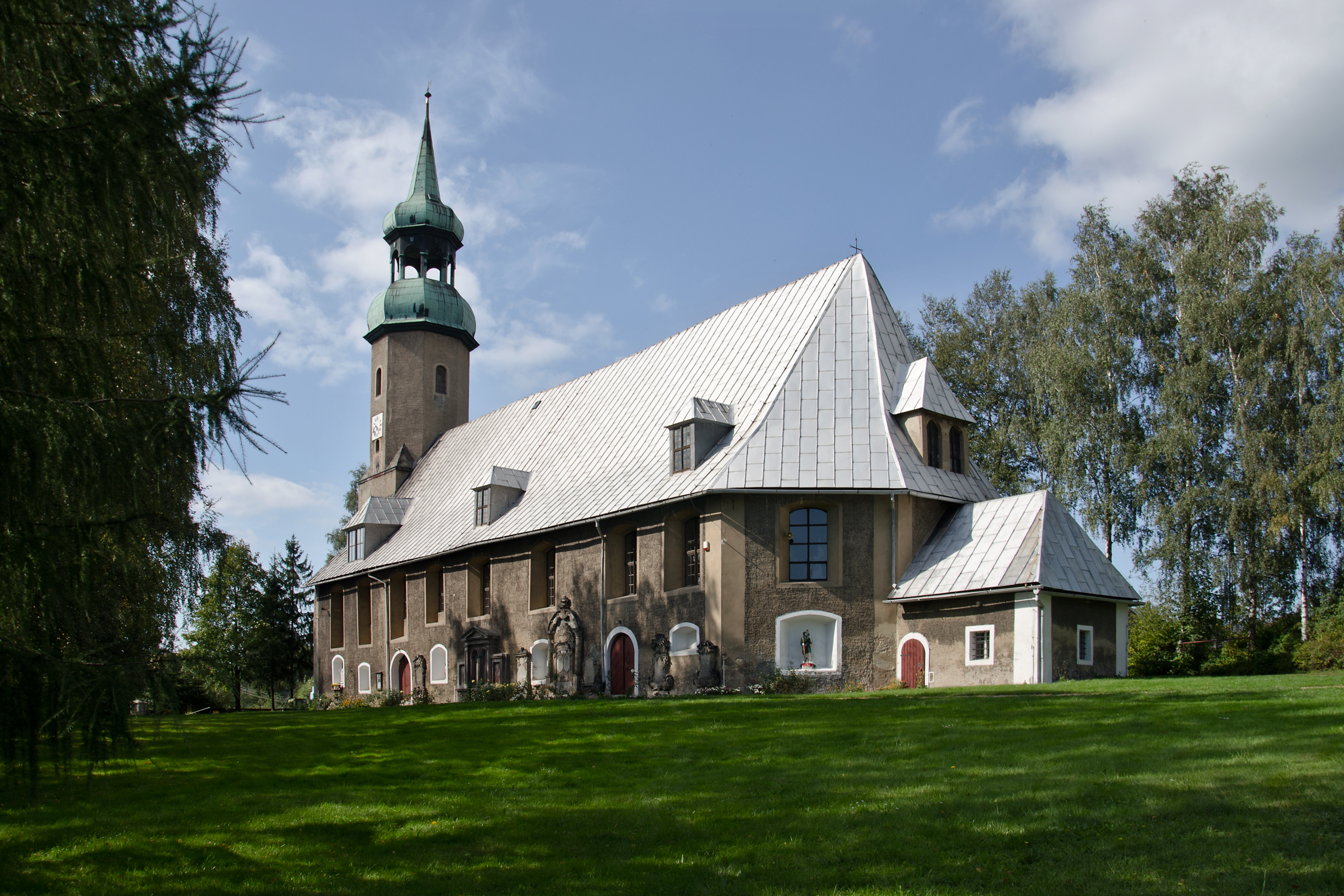 kościół fil. p.w. św. Michała Arch., XVI-XVIII w., Giebułtów, powiat lwówecki